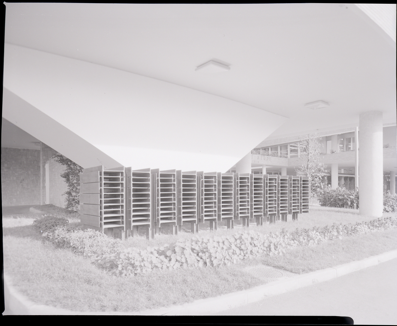 Servizio fotografico : Napoli, 1965 / Paolo Monti. - Buste: 1, Fototipi: 1 : Negativo b/n, gelatina bromuro d'argento/ pellicola ; 10x12. - ((Serie costituita da 1 busta sciolta di negativo identificato con il n.: 12030. - Fonte: Agenda di Paolo Monti: Monti/ 2/ 6 giugno 1964 - 31 marzo 1966/ 8194-12420 (1964-1966), presso Archivio Paolo Monti